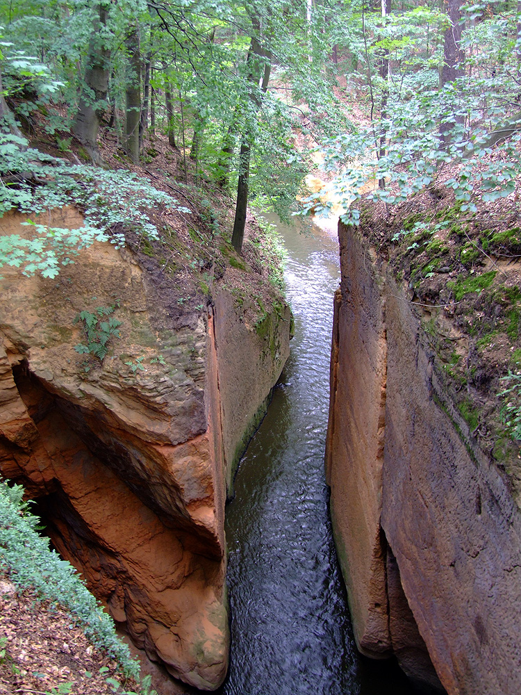 Průrva Ploučnice